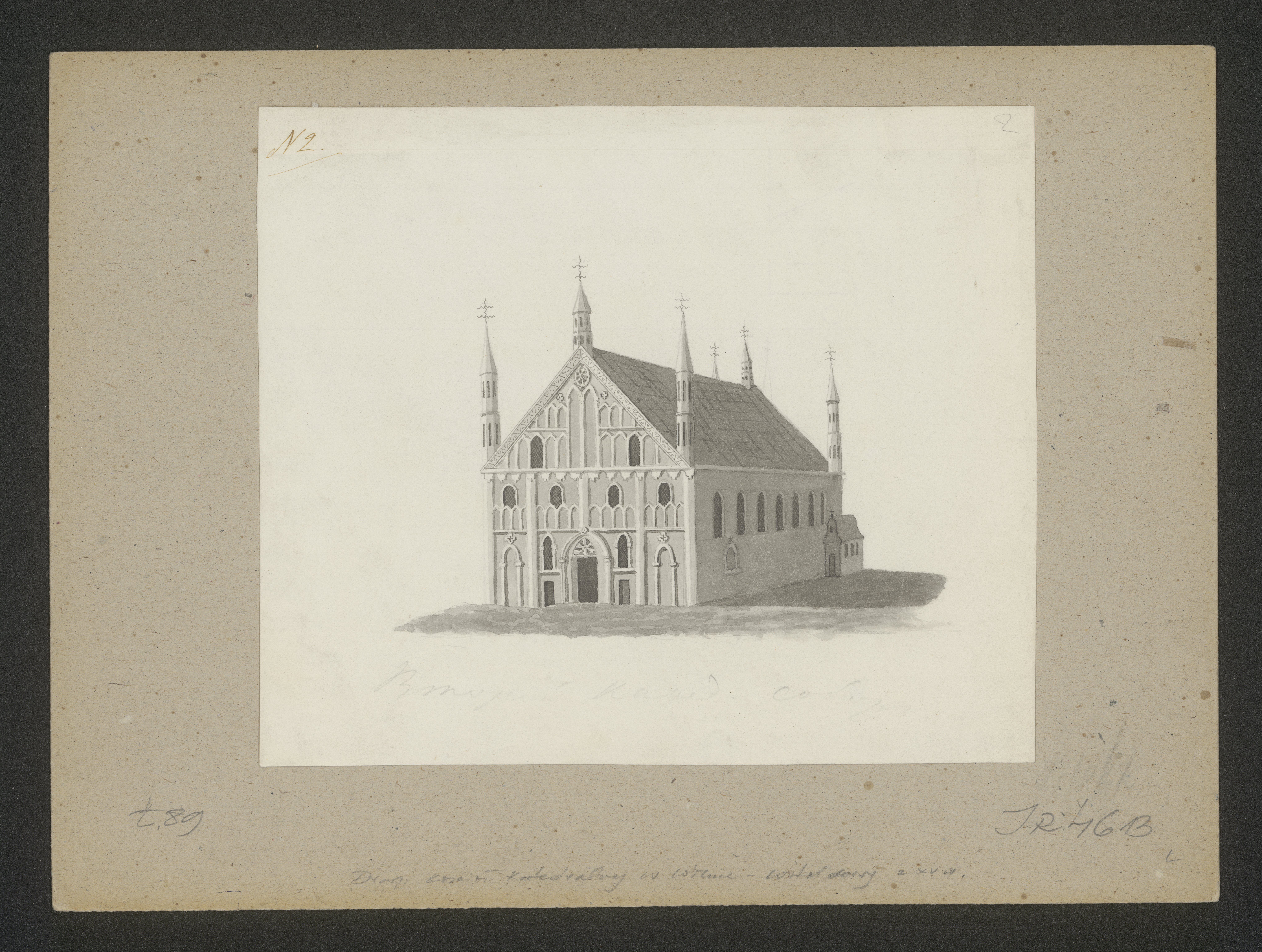 Беларуская (тарашкевіца): Вільня (Vilnia), Катэдра. Рэканструкцыя 1407 год